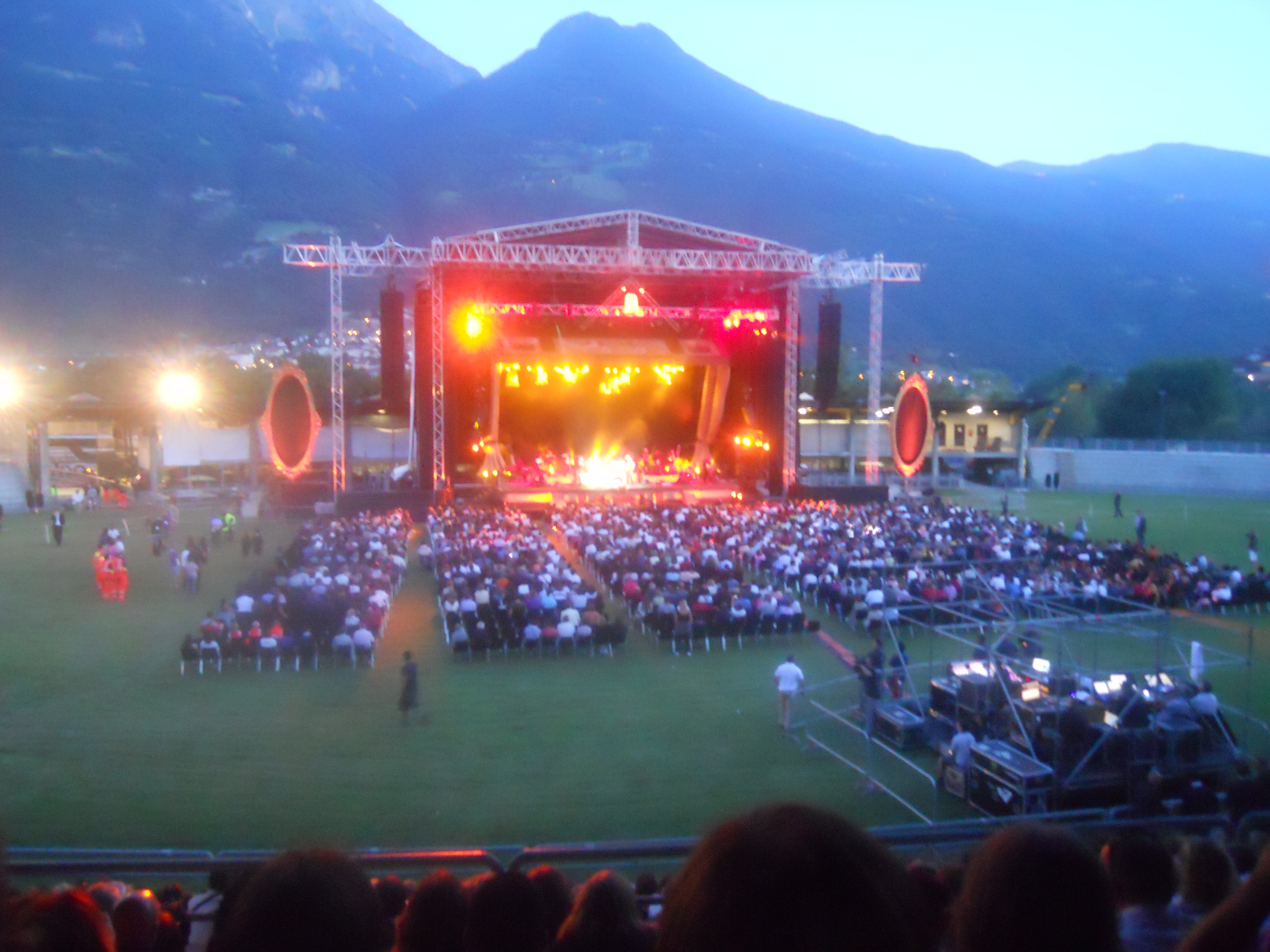 Veduta del Palco di Zucchero per il Chocabeck tour 2011